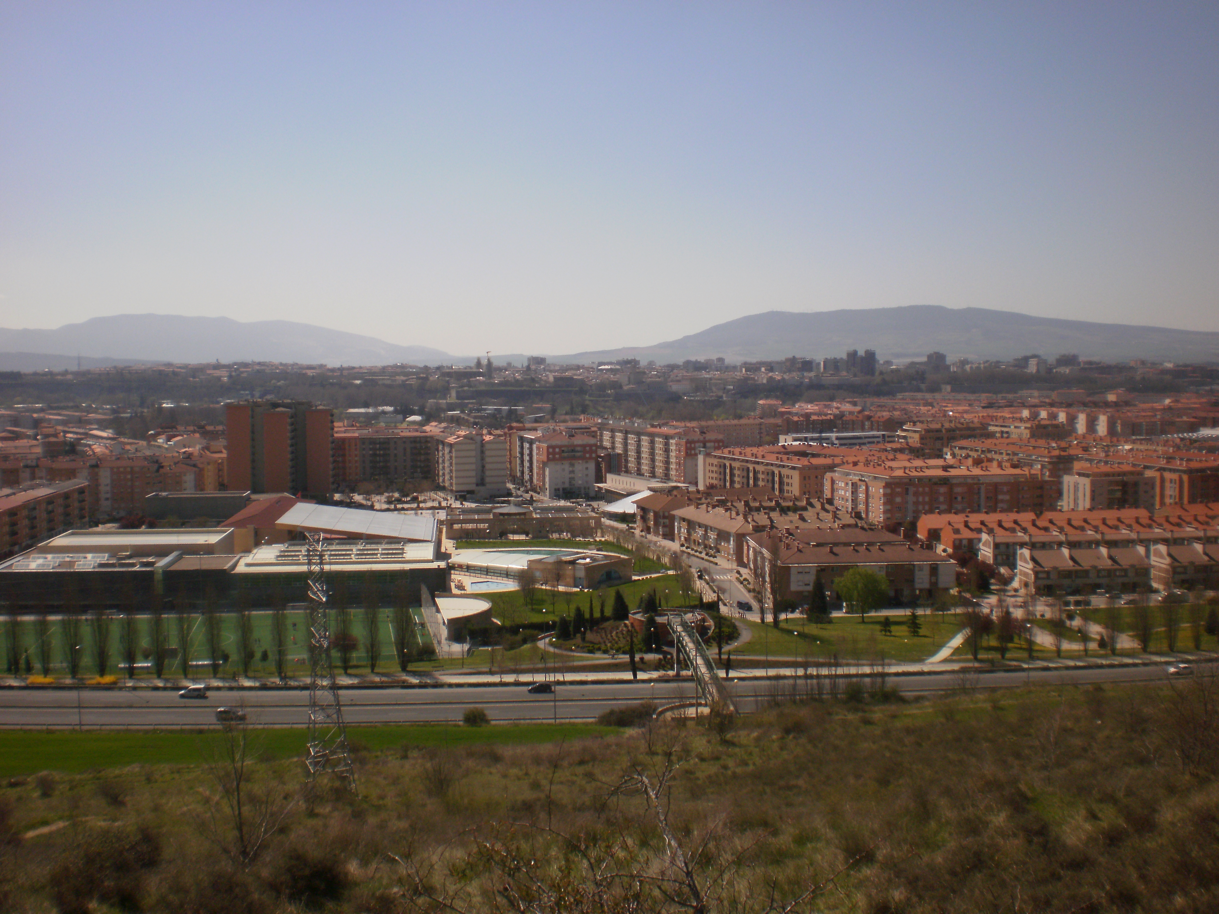 Vista panorámica de Ansoáin desde el monte Ezcaba o San Cristóbal. En segundo término Pamplona y al fondo las sierras de Aláiz y El Perdón.